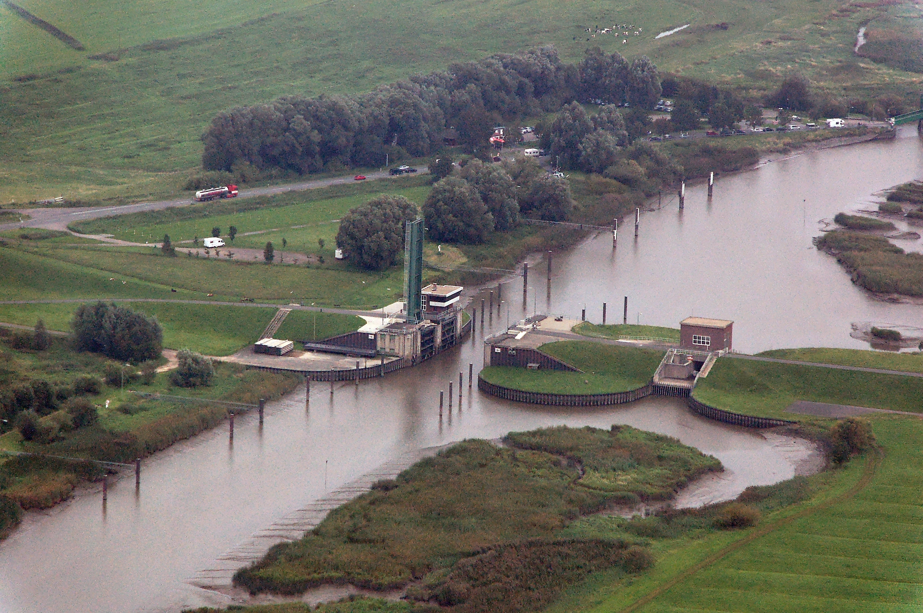 Impressionen Fotoflüge September 2011 (CPB); Sperrwerk Wischhafen und Fahrzeugschlange am Fähranleger Wischhafen, Wischhafener Süderelbe zwischen Wischhafen (links) und Drochtersen-Krautsand (rechts), Landkreis Stade, Niedersachsen, Deutschland Dieses Foto entstand aufgrund eines Projektes, das von Wikimedia Deutschland e. V. gefördert wurde. Im Rahmen des „Community-Projektbudgets“ sollen Luftbilder u.a. von Inseln, Halligen, Sanden und Küstenstädten der deutschen Nordseeküste angefertigt werden. Das Projekt „Fotoflüge“ wurde im September 2011 begonnen.